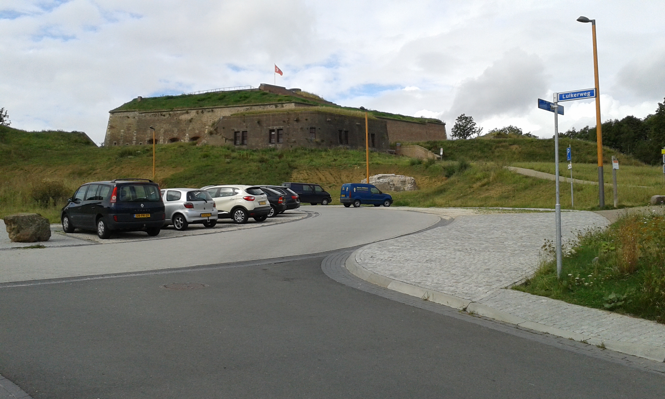 מצודת סינט פיטר - מאסטריכט